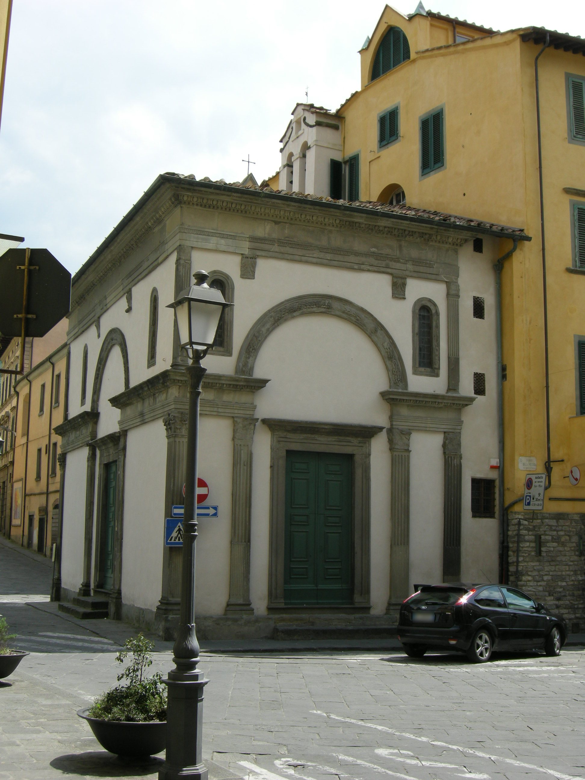 Pescia, Chiesa Madonna di piazza